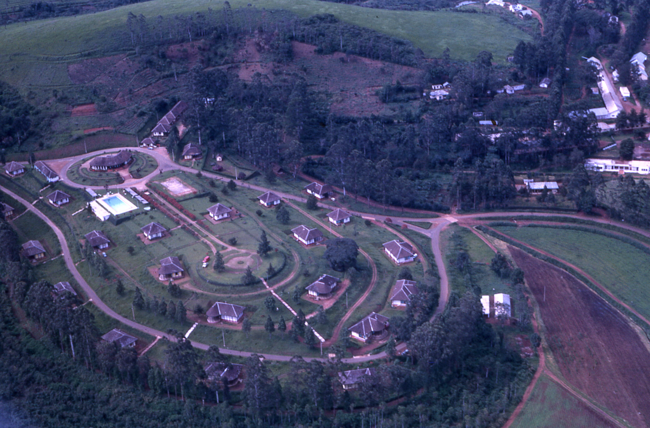 Le Centre climatique de Dschang. Au fond à droite, les bâtiments de la station de Recherche de l'IRAT. En bas, à droite, ma case, au bord des parcelles. Cam107 La colline, encore vide à l'époque, abrite aujourd'hui l'Université d Agronomie.